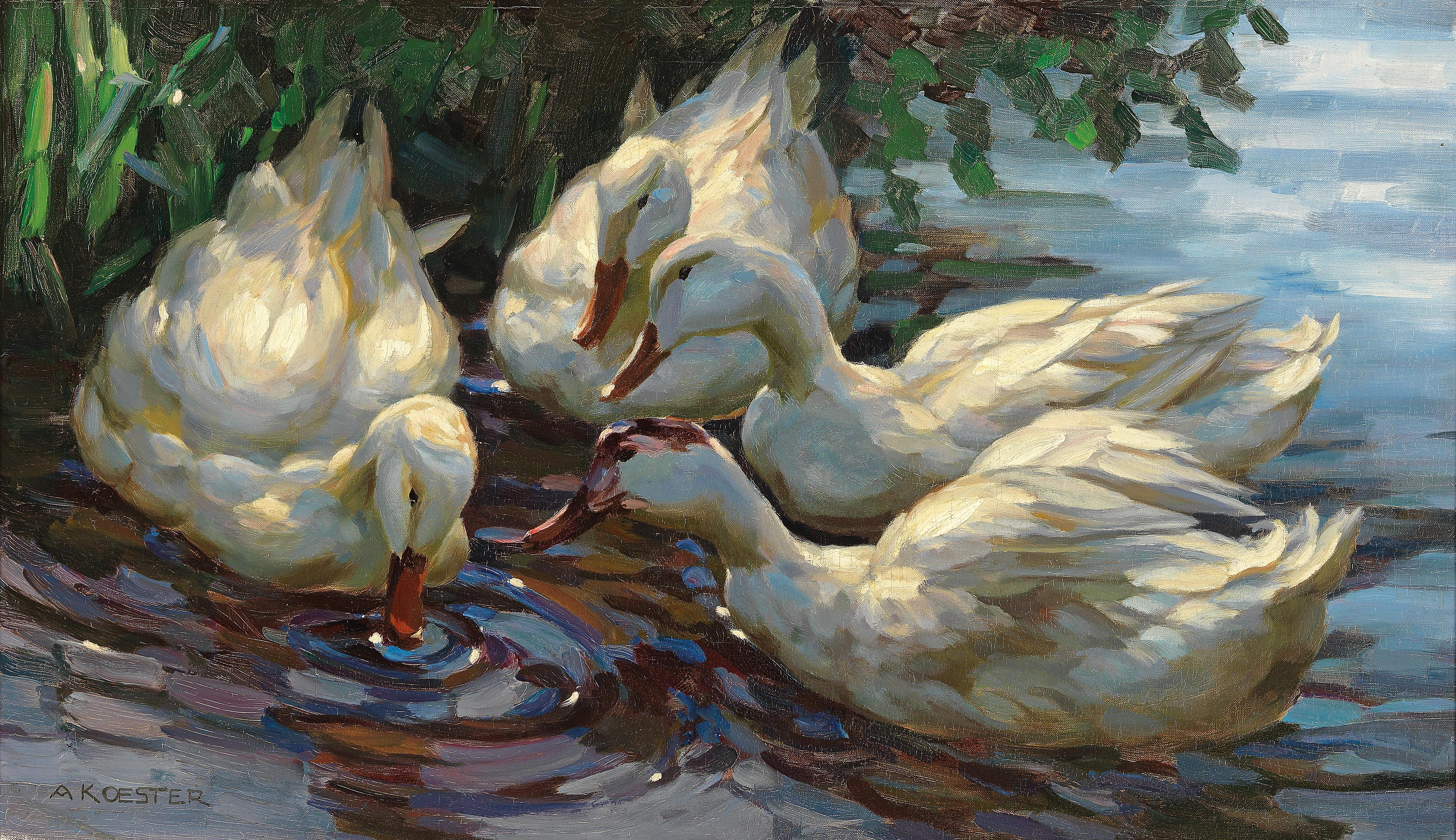 Vier Enten am Weiher, signiert A. Koester, Öl auf Leinwand, 46 x 78,5 cm